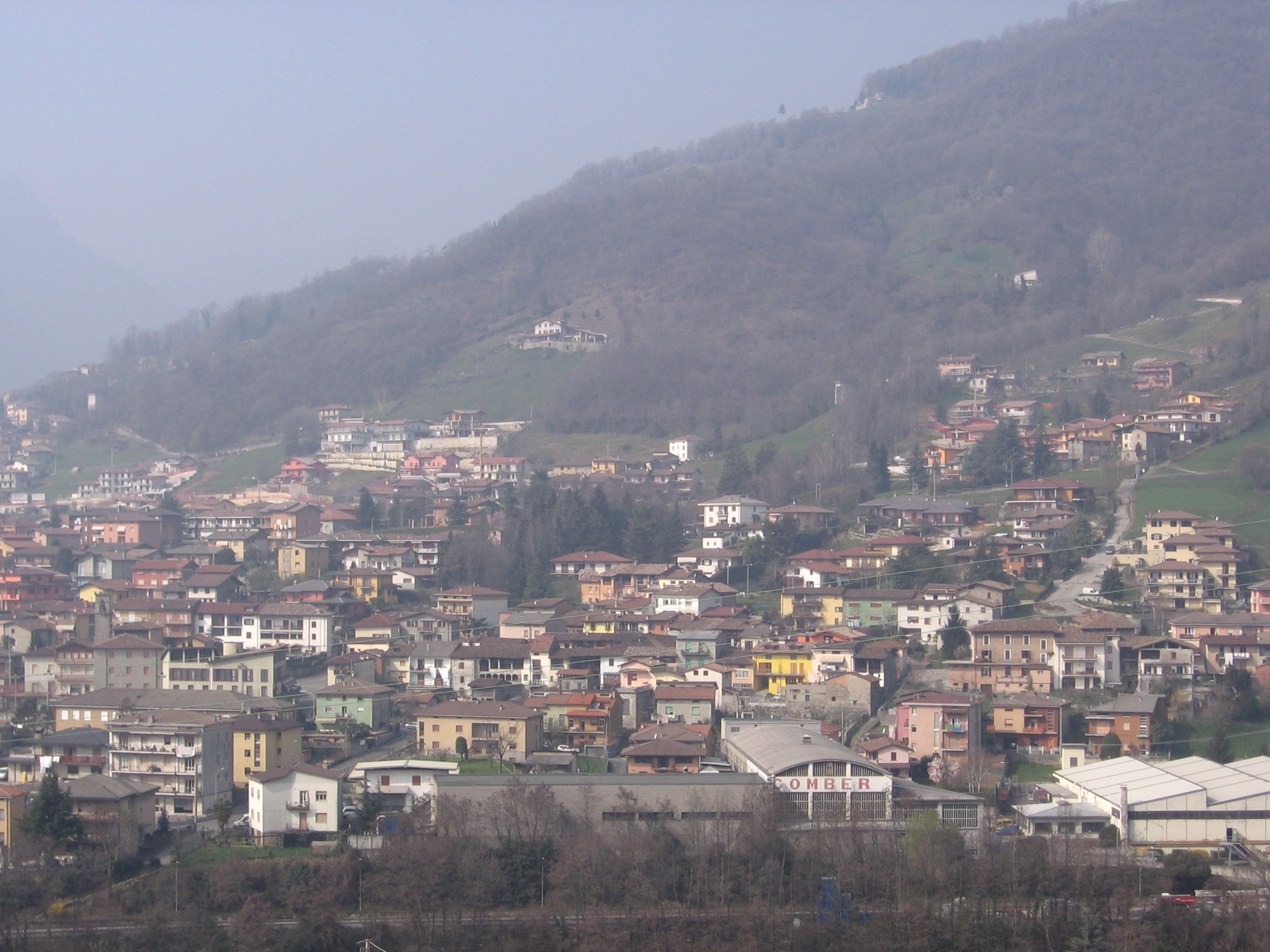 Colzate, Bergamo, Italia